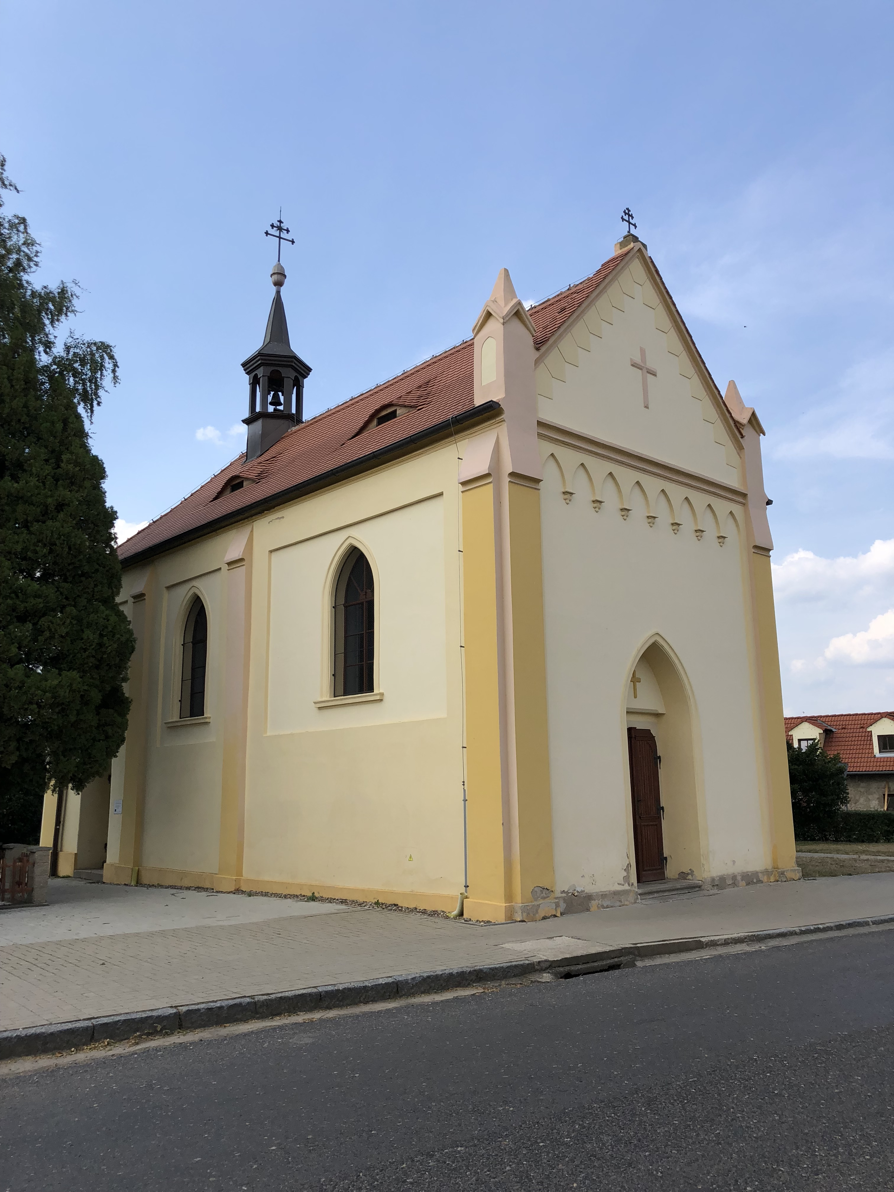 Kaple sv. Václava v Keblicích